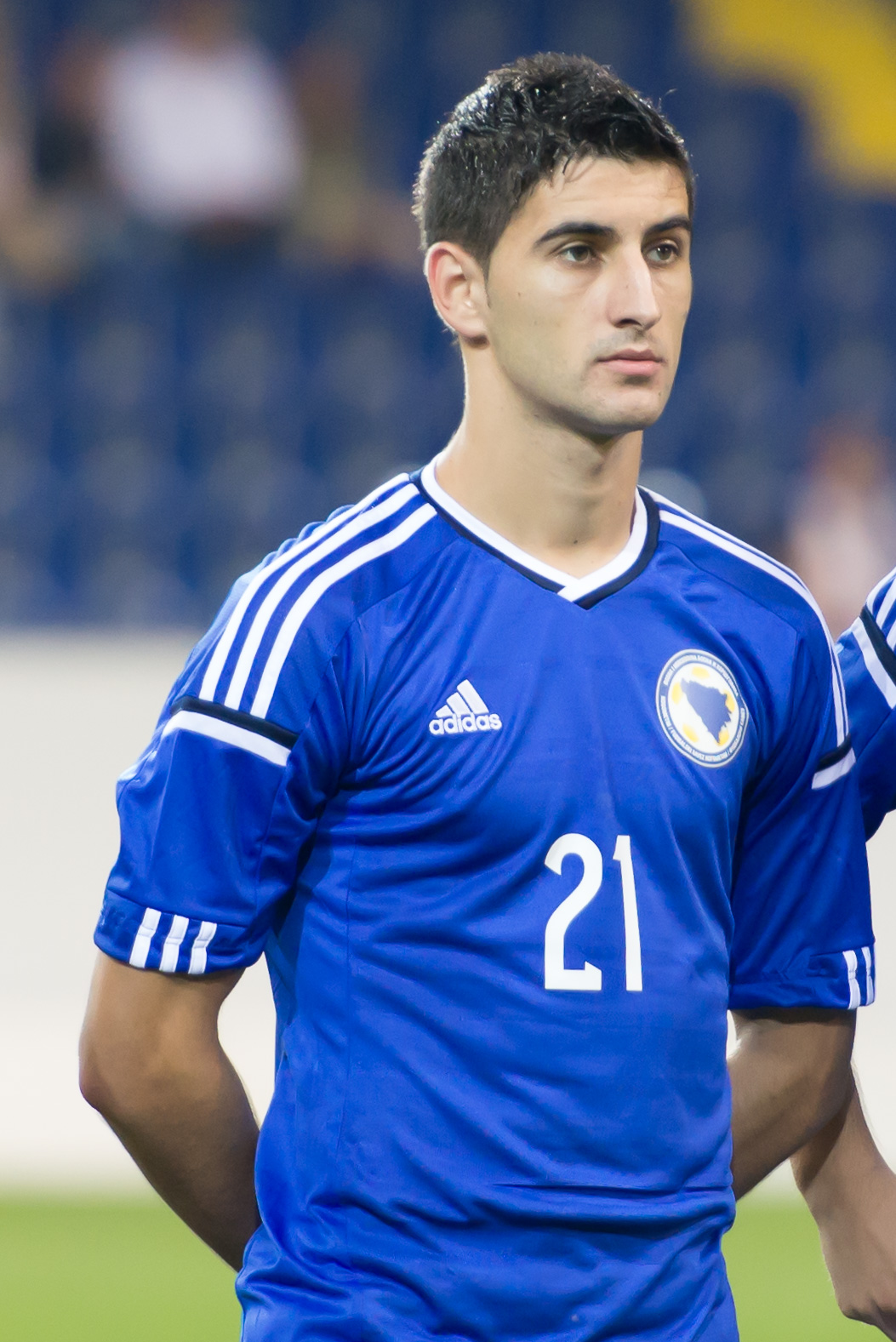 Fußball U21 EM-Qualifikation Österreich gegen Bosnien und Herzegowina St. Pölten, 5. September 2014 Bojan Letić